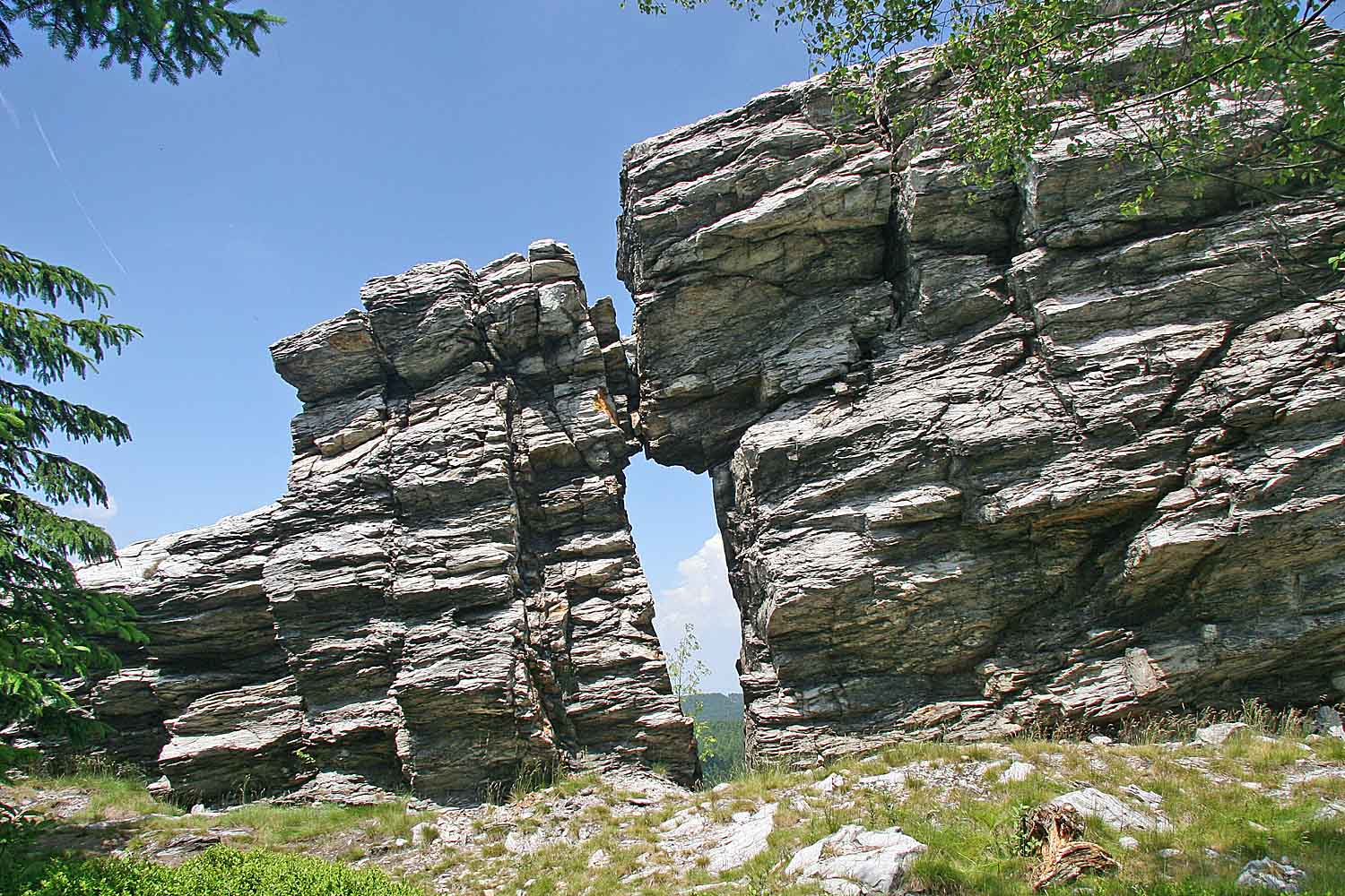 PP Terasy Ještědu - Kamenná vrata